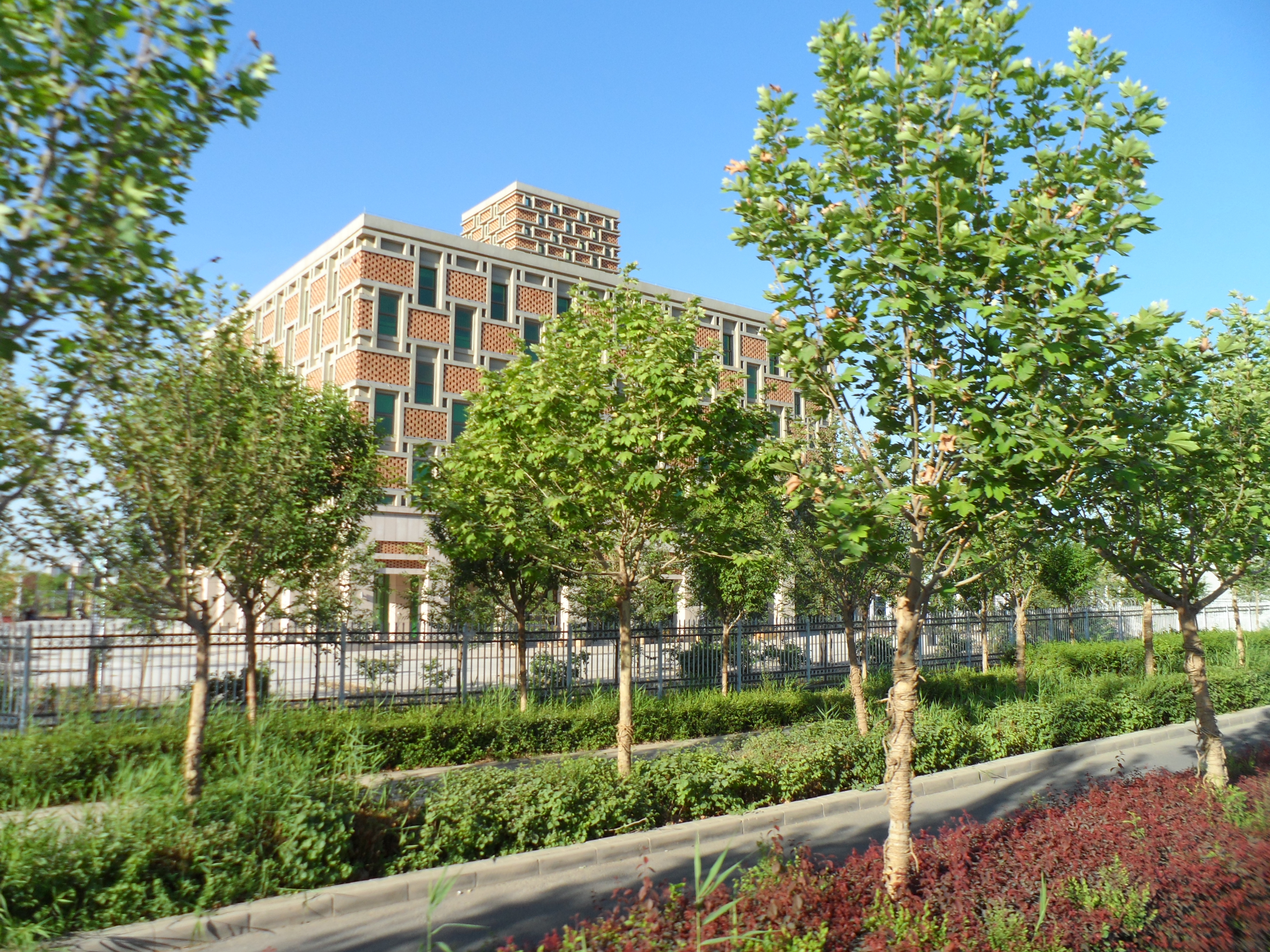 吐鲁番图书馆